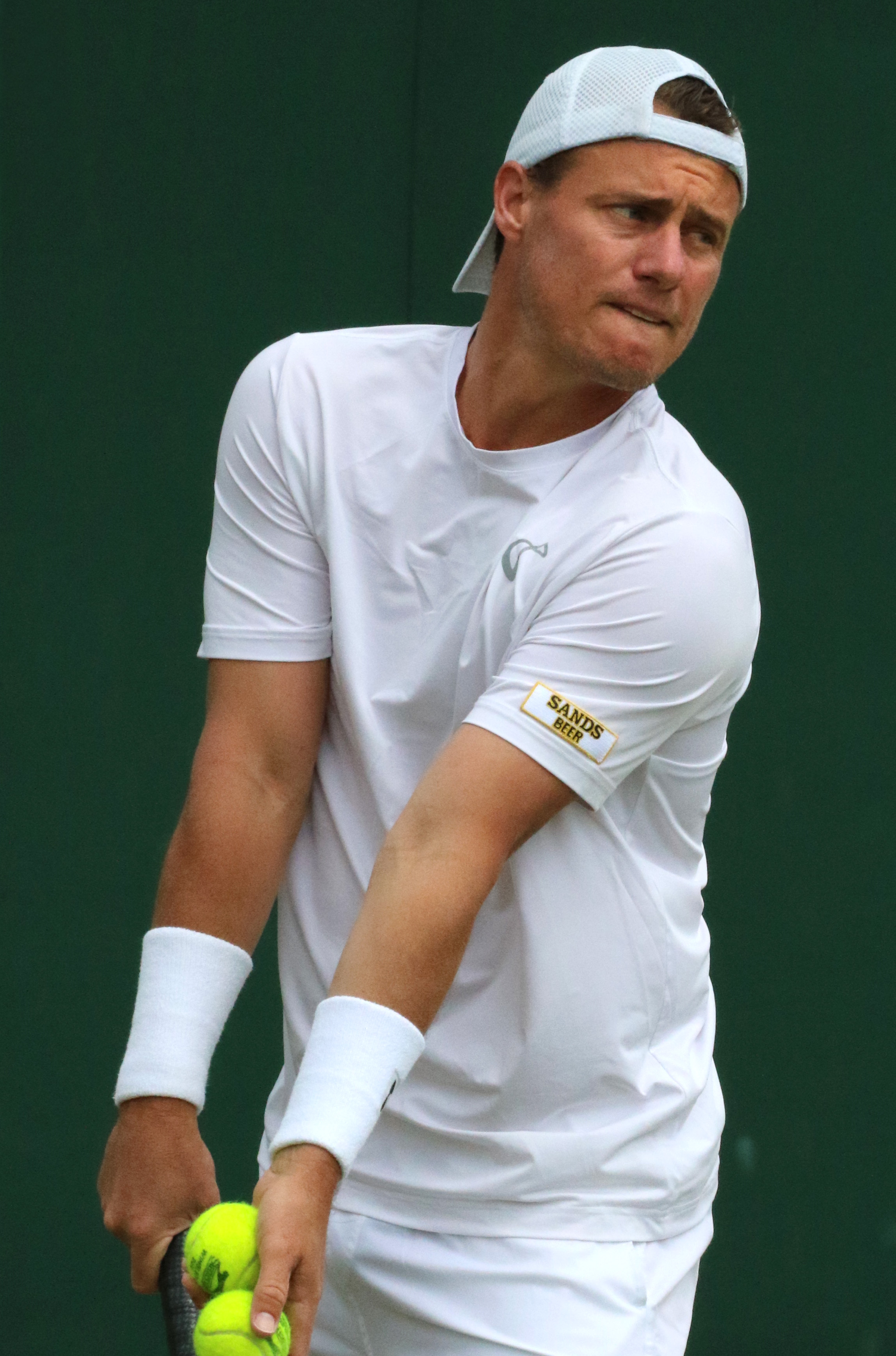 Hewitt WM16 (12)